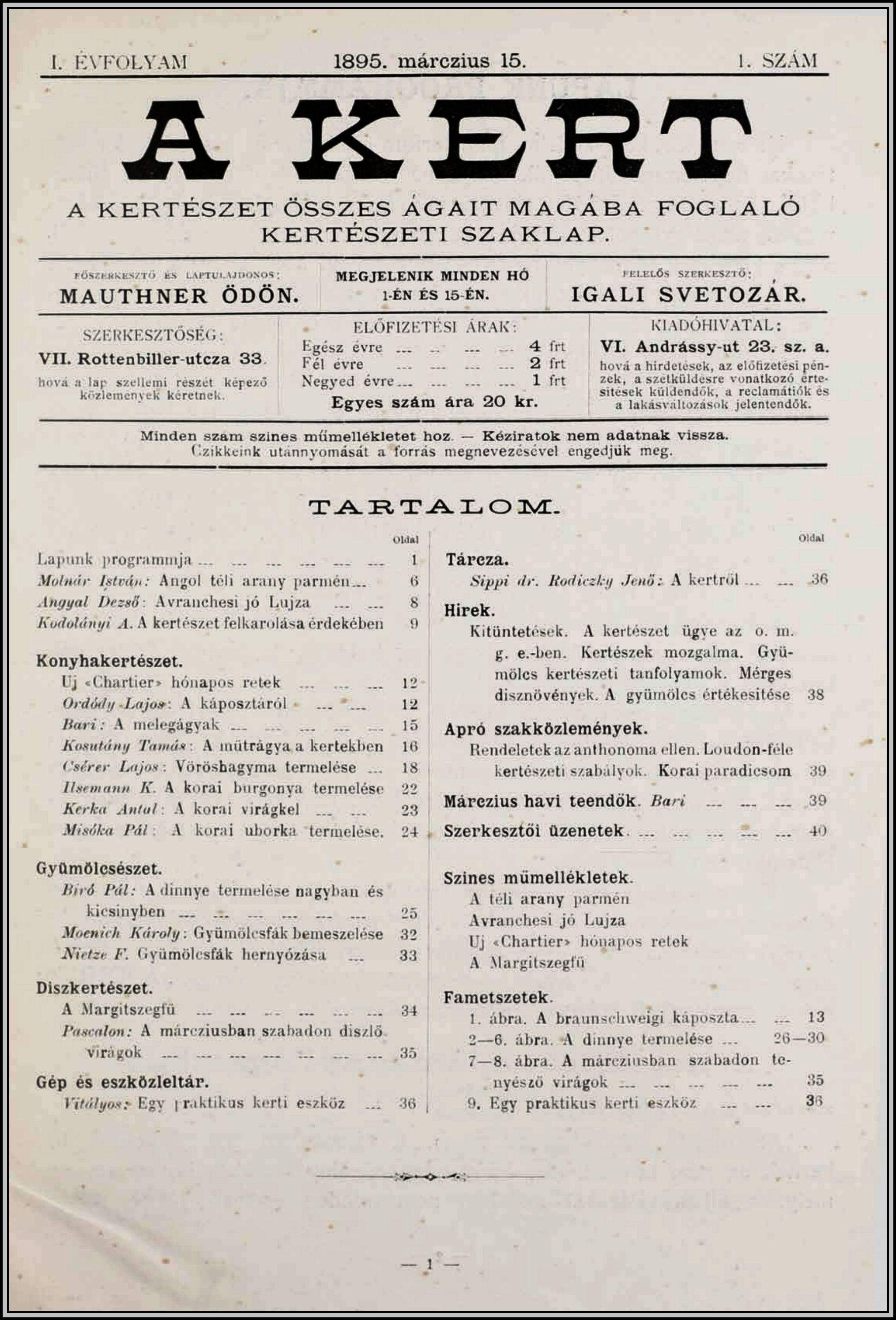 A kertészet összes ágait magába foglaló szaklap, laptulajdonos Mauthner Ödön mag-nagykereskedő, kertész, kertészeti szakíró, az ország legnagyobb, 1874 és 1947 között fennállott vetőmag kereskedésének alapító-tulajdonosa. A teljességében gyakorlatilag beszerezhetetlen lapot az a szándék vezérelte, hogy a legszélesebb kör számára fóruma legyen a tág értelemben vett kertészeti szakmának, tudománynak, akár nagybirtokos gazda, akár egyszerű hobbi-kertészről van szó.